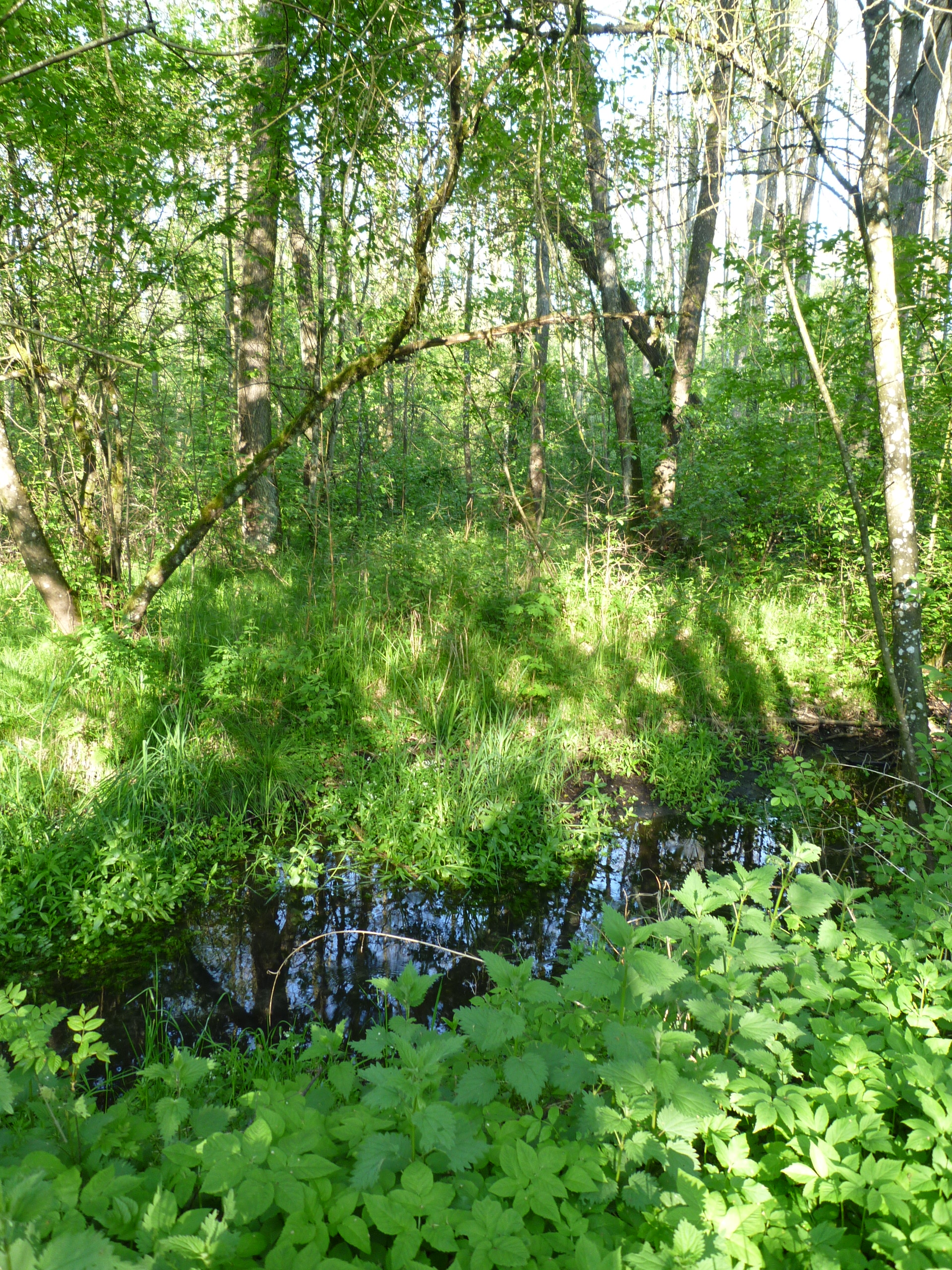 Die Wälder im Donautal erstrecken sich über die Landkreis Straubing-Bogen und Regensburg. Sie zeichnen sich durch ihre lichten Wälder mit starkem Unterwuchs aus und durch viele Feuchtgebiete. Sie bieten zahlenreichen Tieren und Pflanzen einen Lebensraum. Die Wälder im Donautal sind FFH-Gebiet und EU-Vogelschutzgebiet zugleich. WDPA: 555579395.